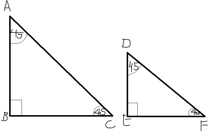 △ABC ~ △DEF